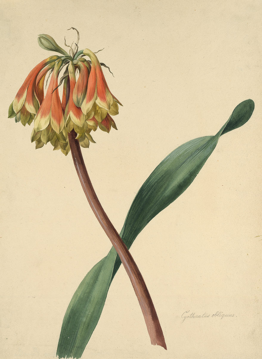 Südafrikanische Bogenlilie (Cyrtanthus obliquus)